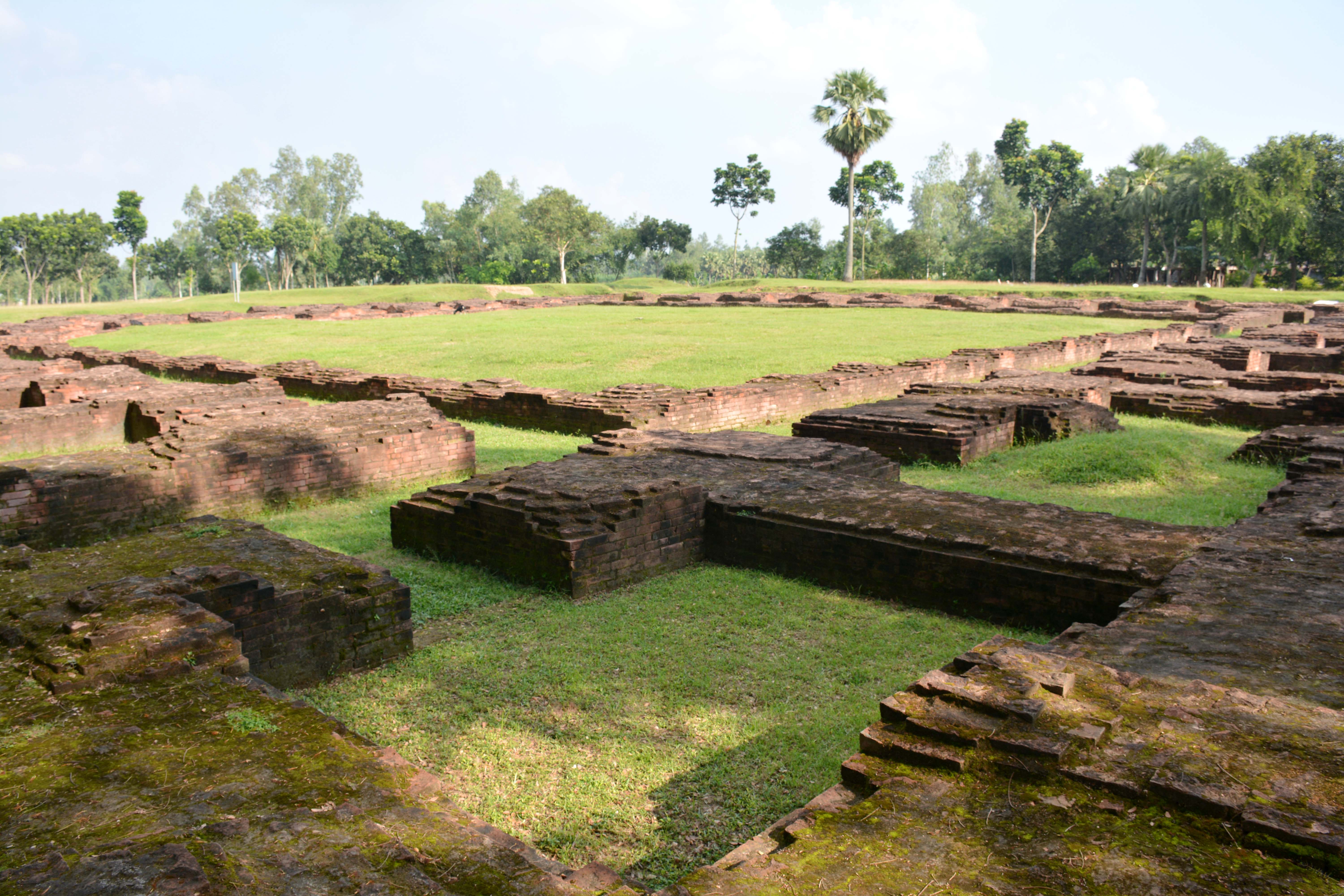 তোতারাম পন্ডিতের ধাপ